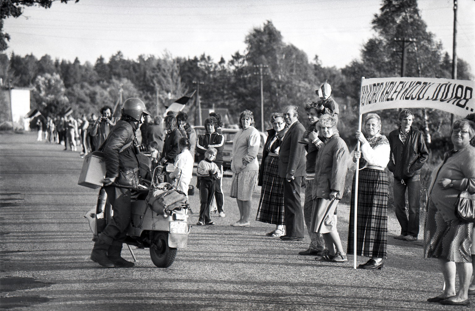 Balti kett 12